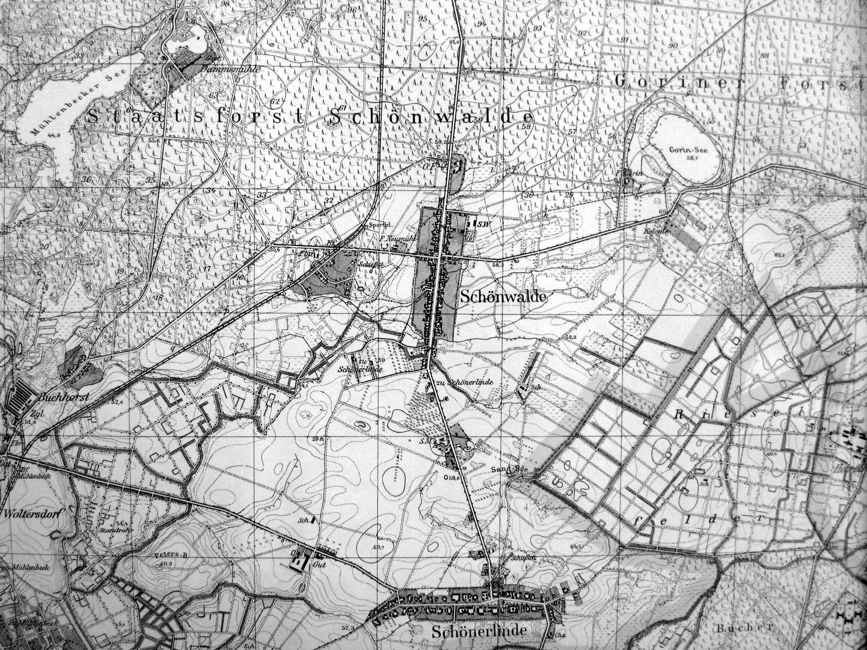 Map of Schönwalde (Barnim), Brandenburg, Germany